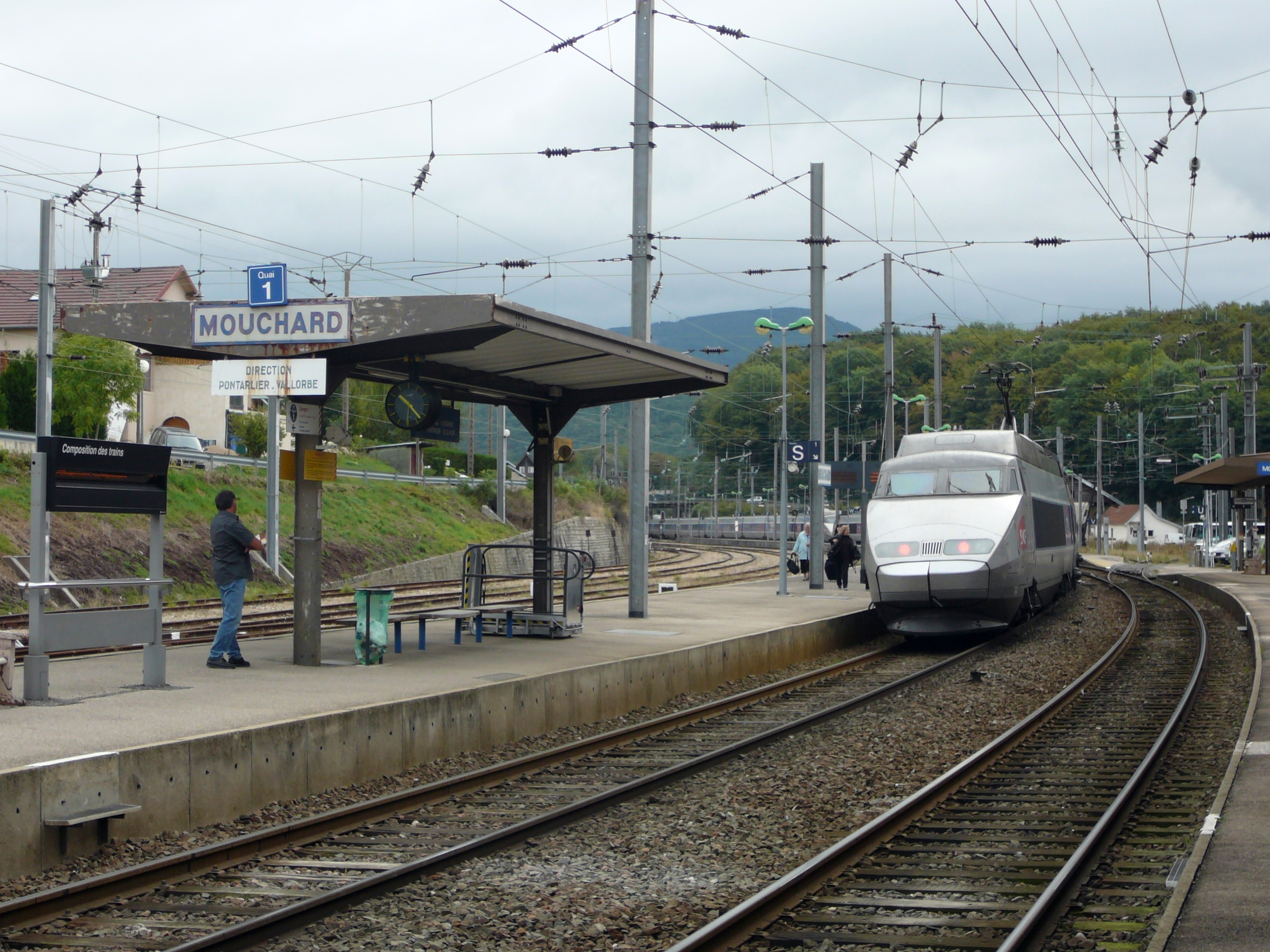 Quai de Mouchard avec TGV en direction de Lausanne et Berne